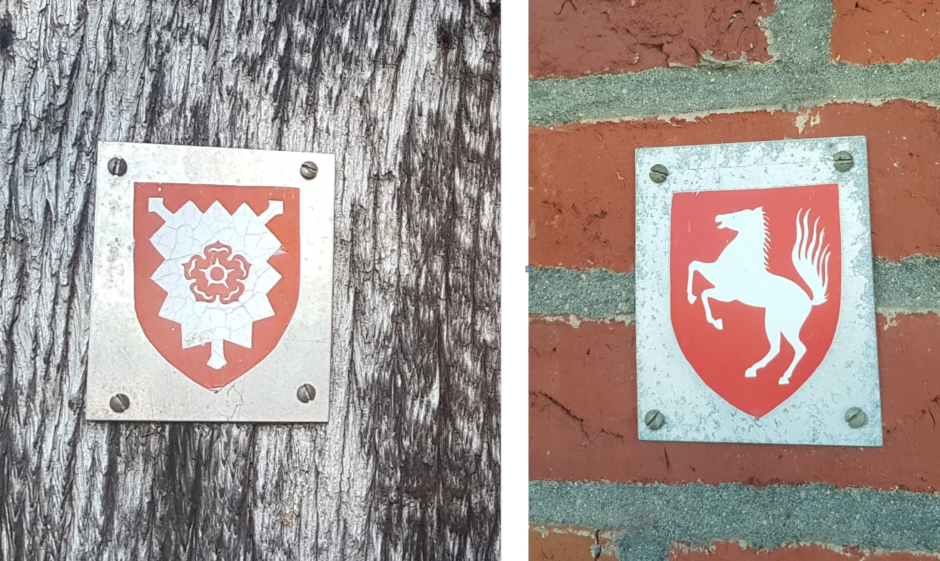 Preußisch und Schaumburg-Lippisches Wappen